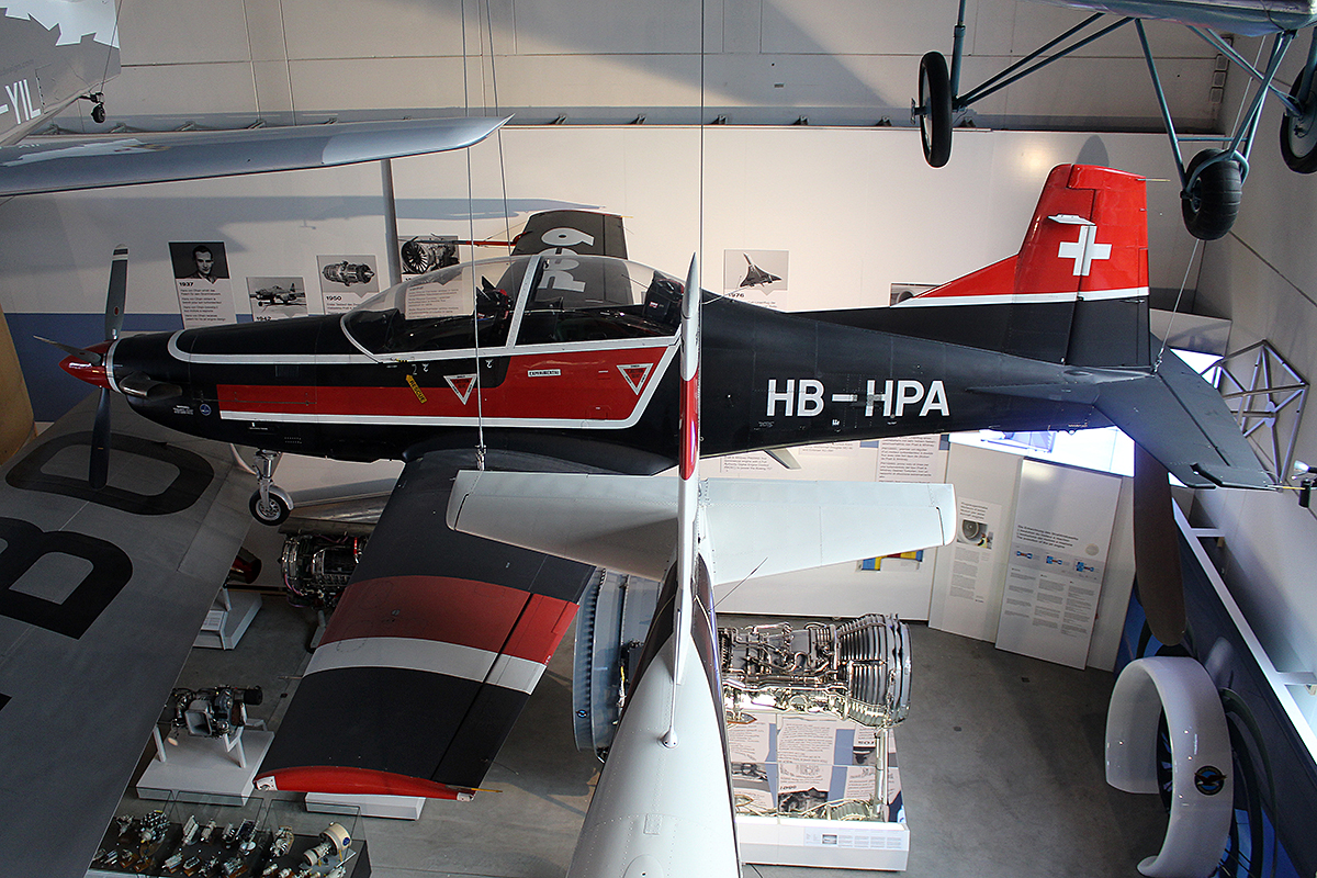 HB-HPA Pilatus PC-9 @ Lucerne Museum 11/04/2019